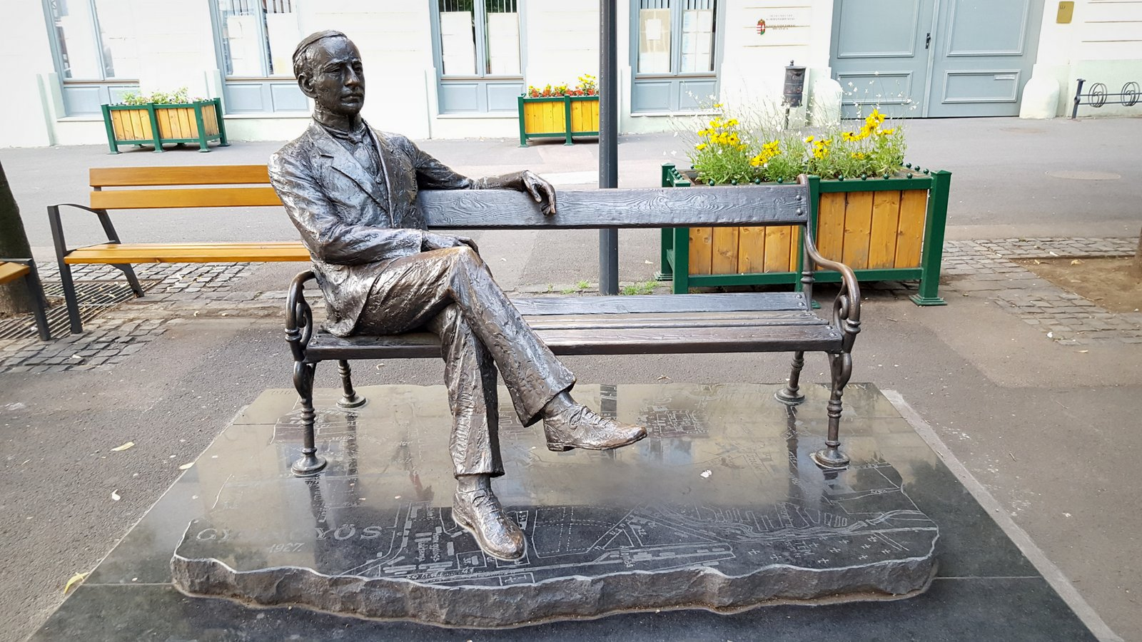 Szobor Puky Árpádról, Gyöngyös 1919-1942 közötti polgármesteréről. Gyöngyös Város Önkormányzata állíttatta és Tóth Dávid készítette. 2010. augusztus 20-án leplezték le.